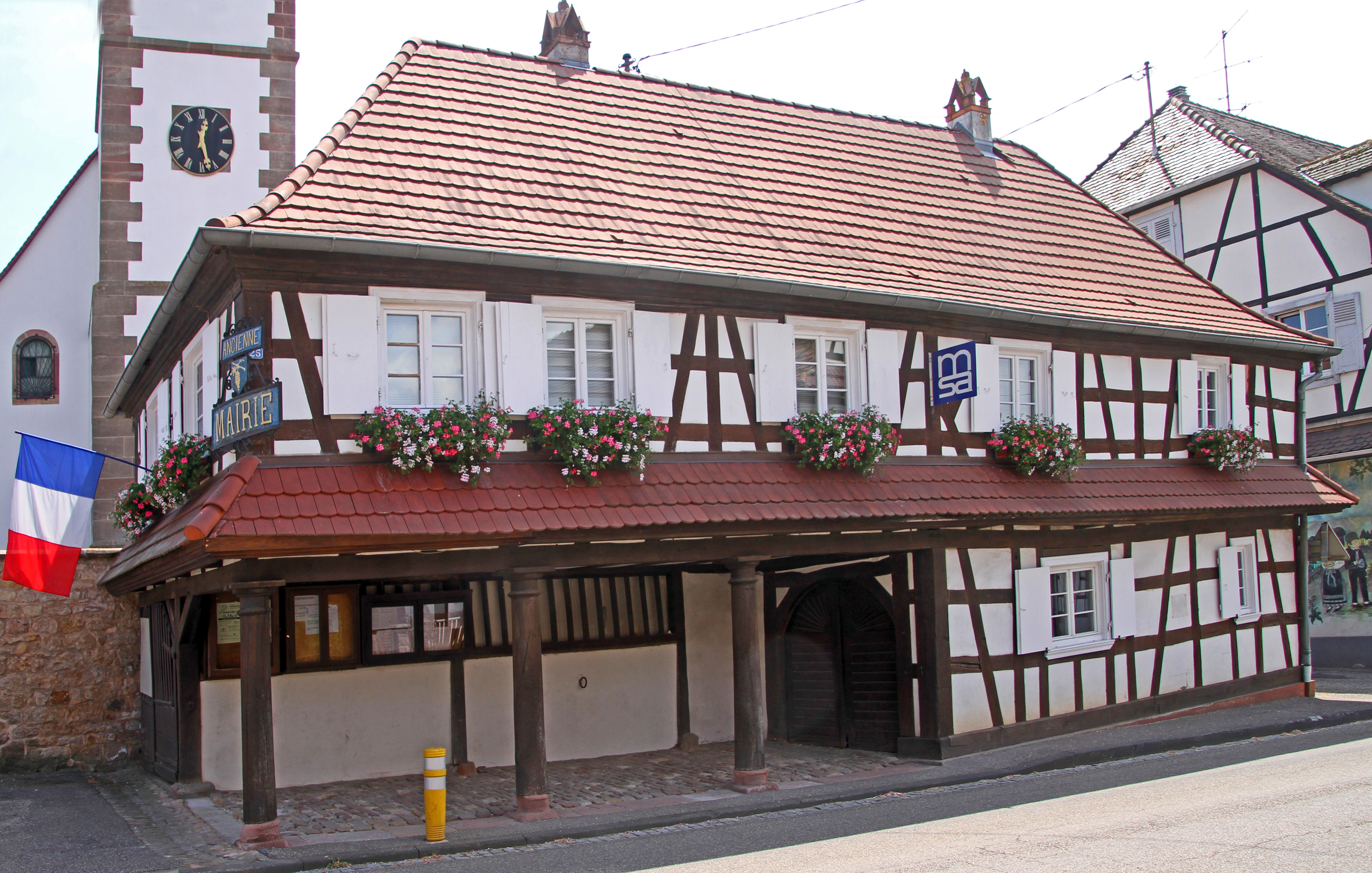 Hoffen